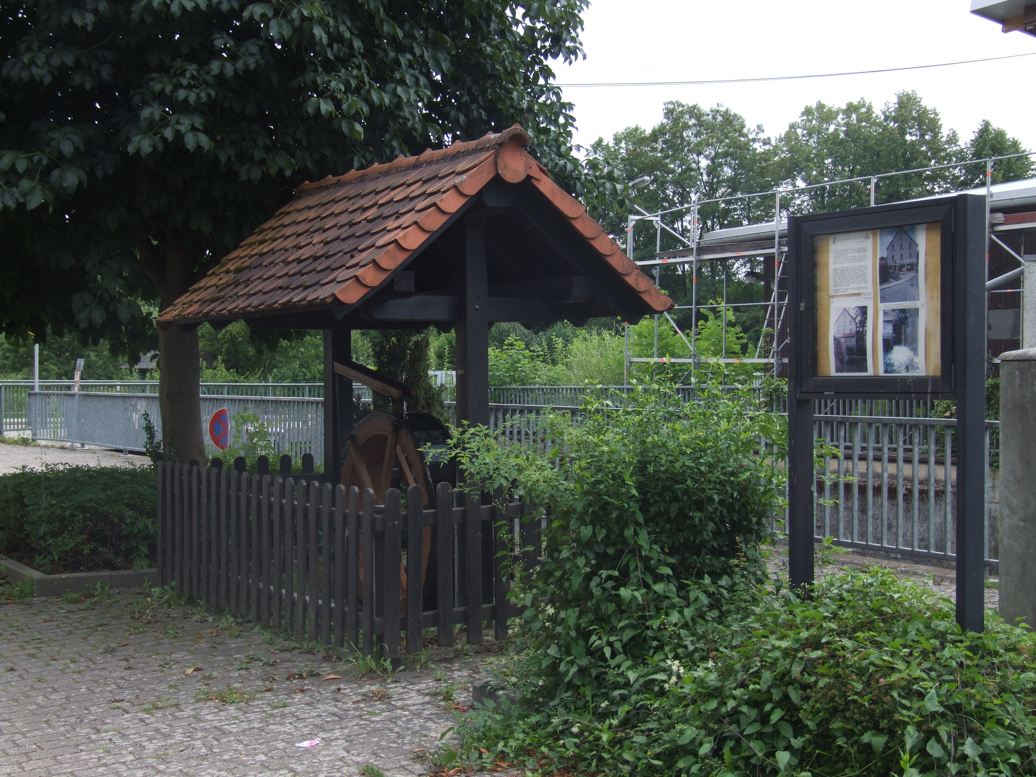 Standort der ehemaligen Ziegler'schen Mühle in Eschelbronn